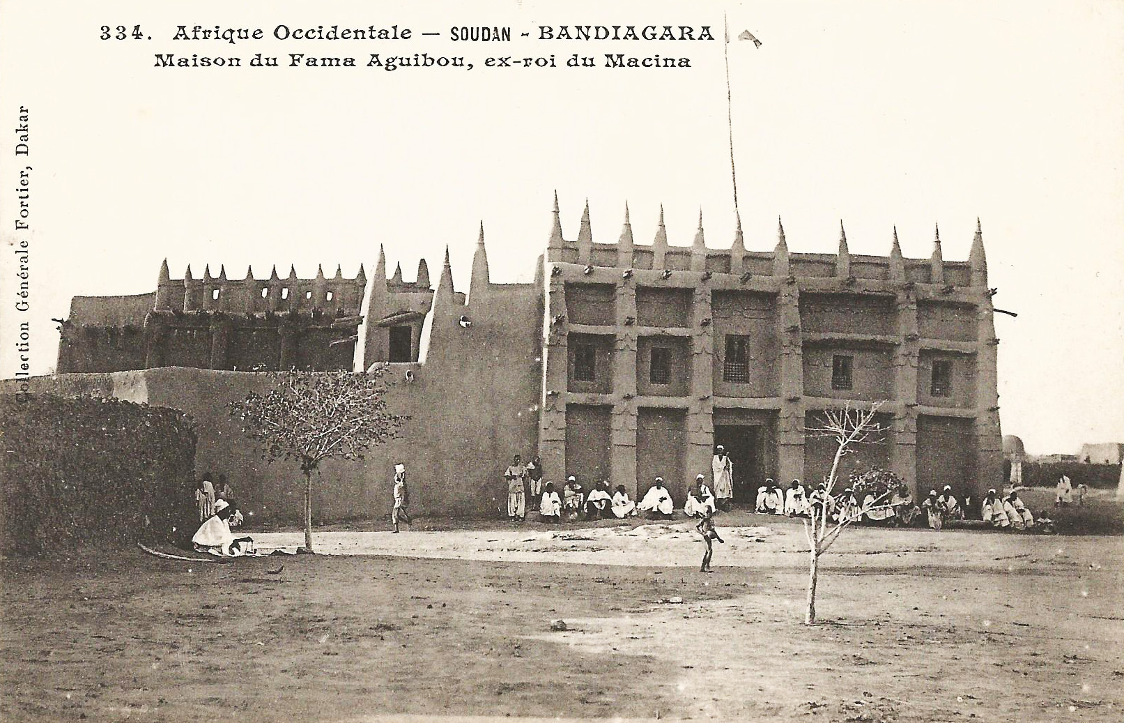 François-Edmond Fortier, Bandiagara. Maison du Fama Aguibou, ex-roi du Macina'. Afrique Occidentale - Soudan.